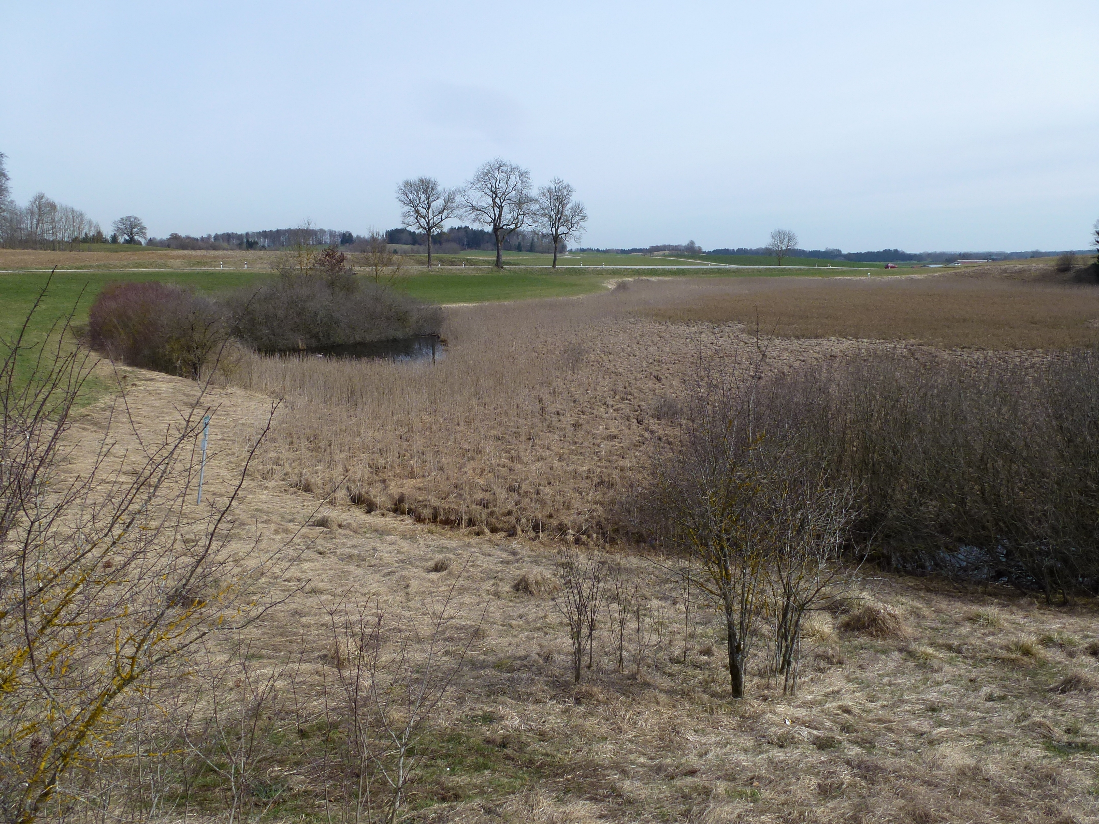 Stark verschilfter Moränensee nordwestlich von Unterfinning; nur noch eine sehr kleine Fläche im Nordwesten ist freies Gewässer. Überblick von Nord-Westen nach Süd-Osten